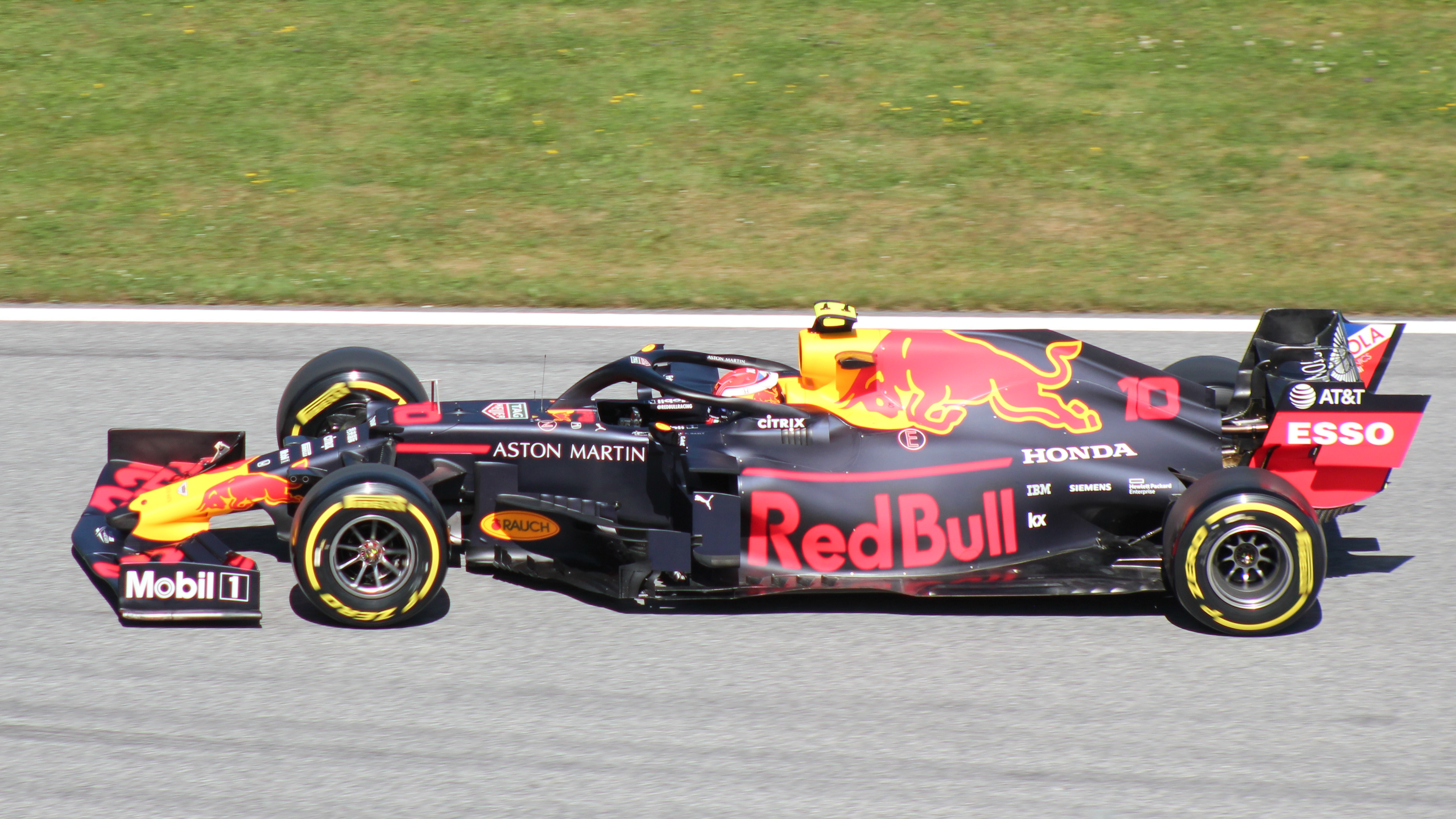 Gasly beim Rennwochenende in Österreich 2019